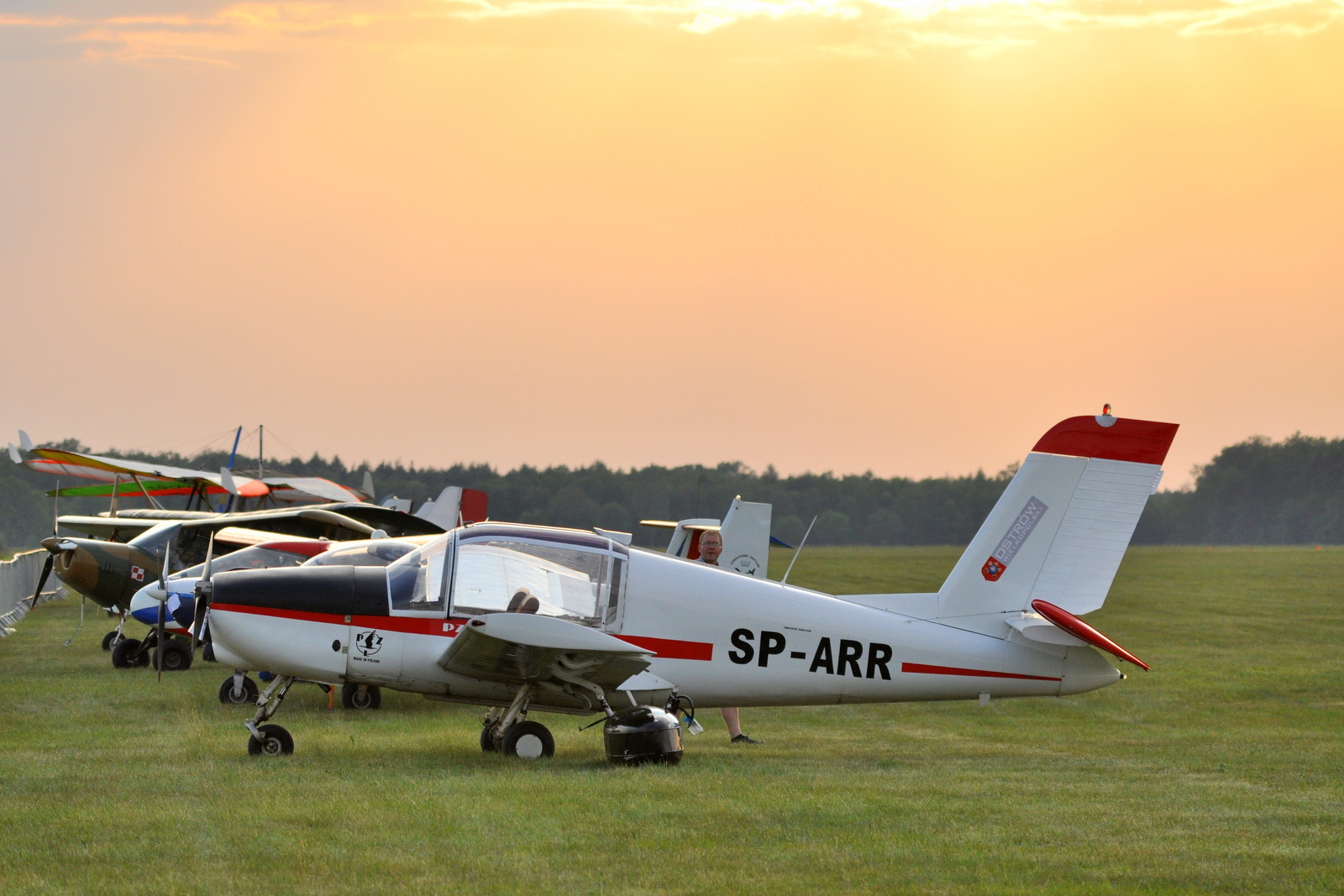 SP-ARR na lotnisku aeroklubu ostrowskiego w Michałkowie.